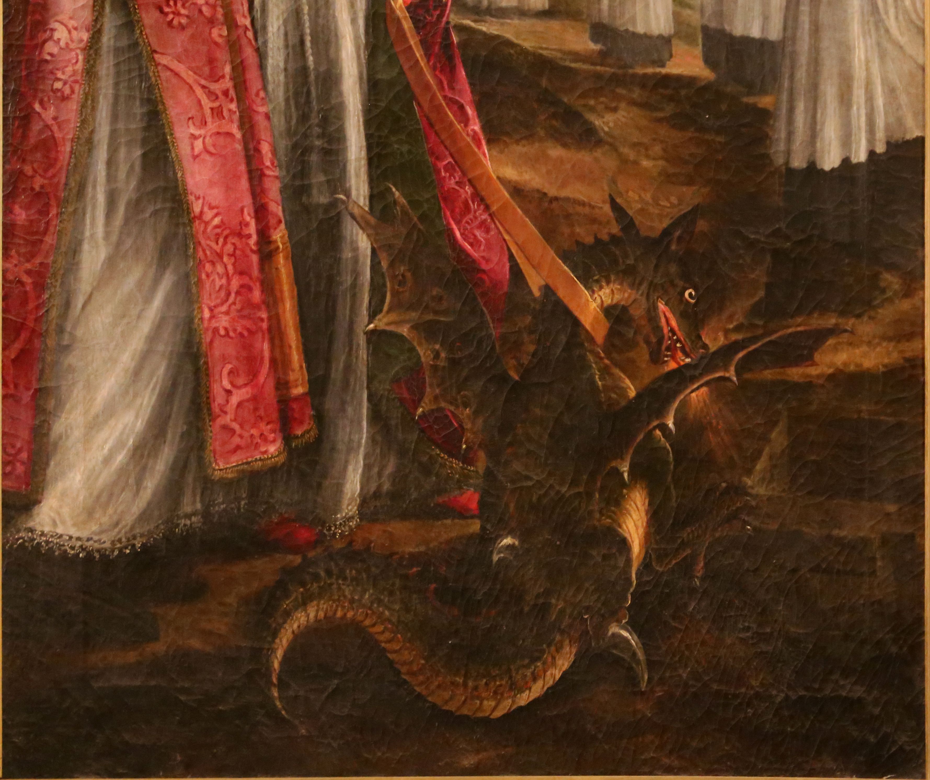 abbazia di San Mercuriale This is a photo of a monument which is part of cultural heritage of Italy.